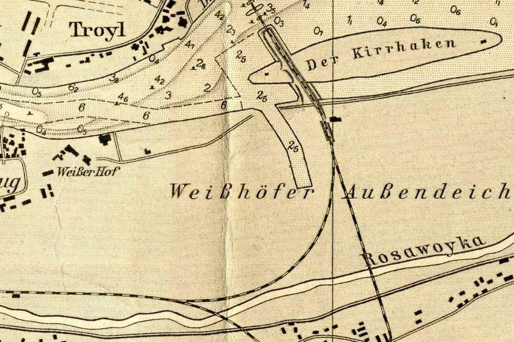 Gdańsk Biały Dworek w 1909 r.